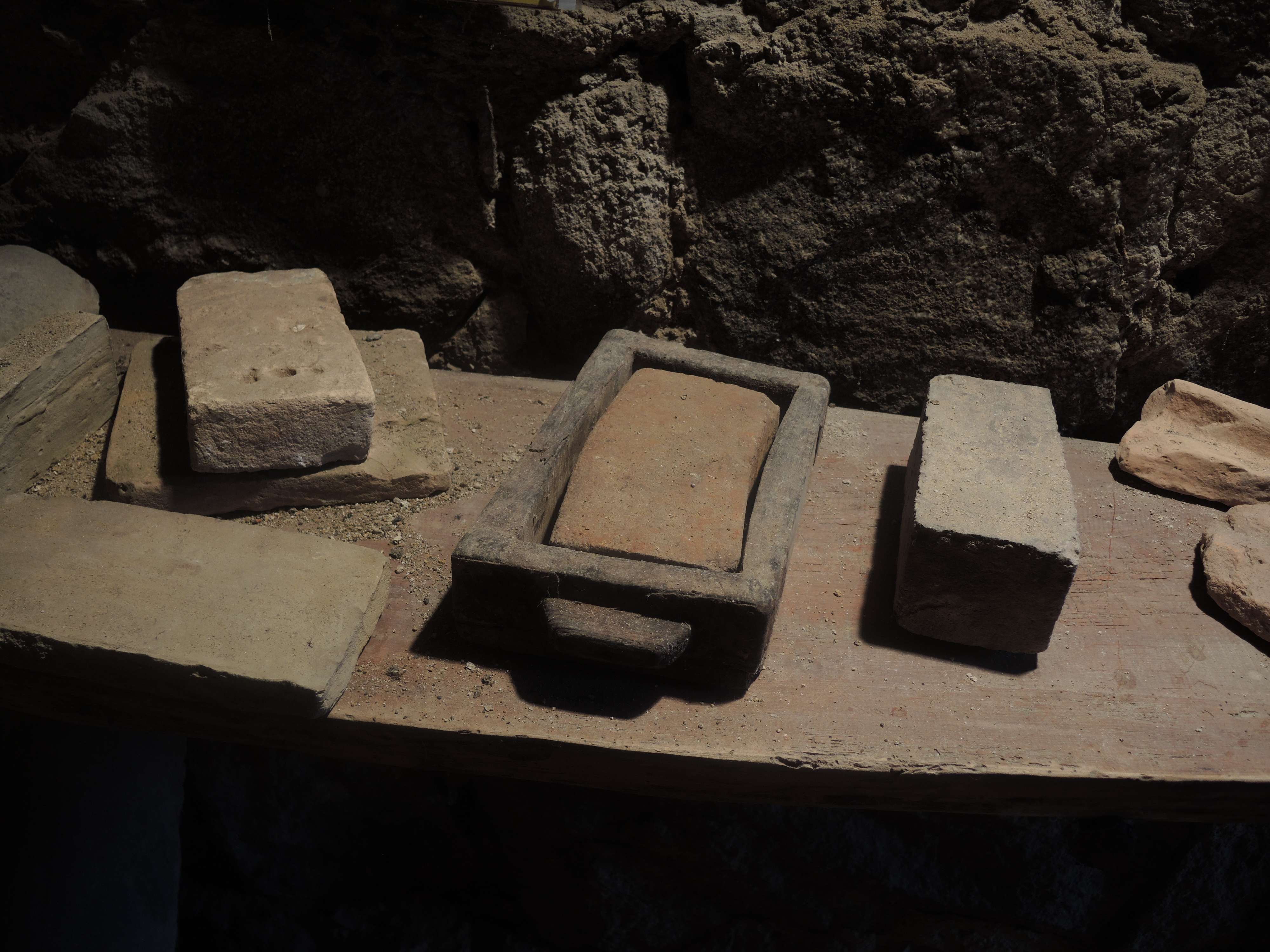 Saint-Etienne-de-Valoux détail